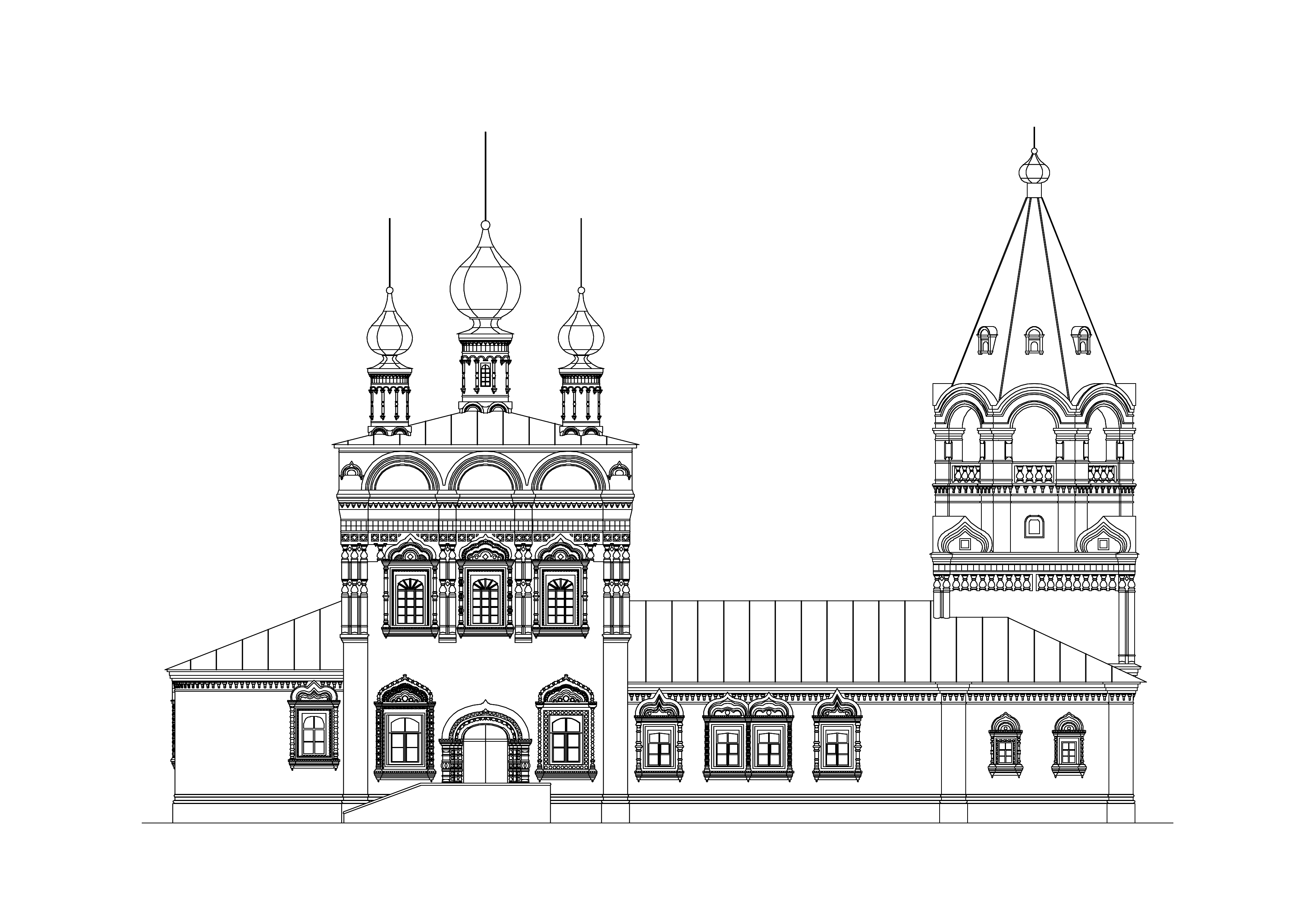 Богоявленская церковь. Чертёж. Город Соликамск